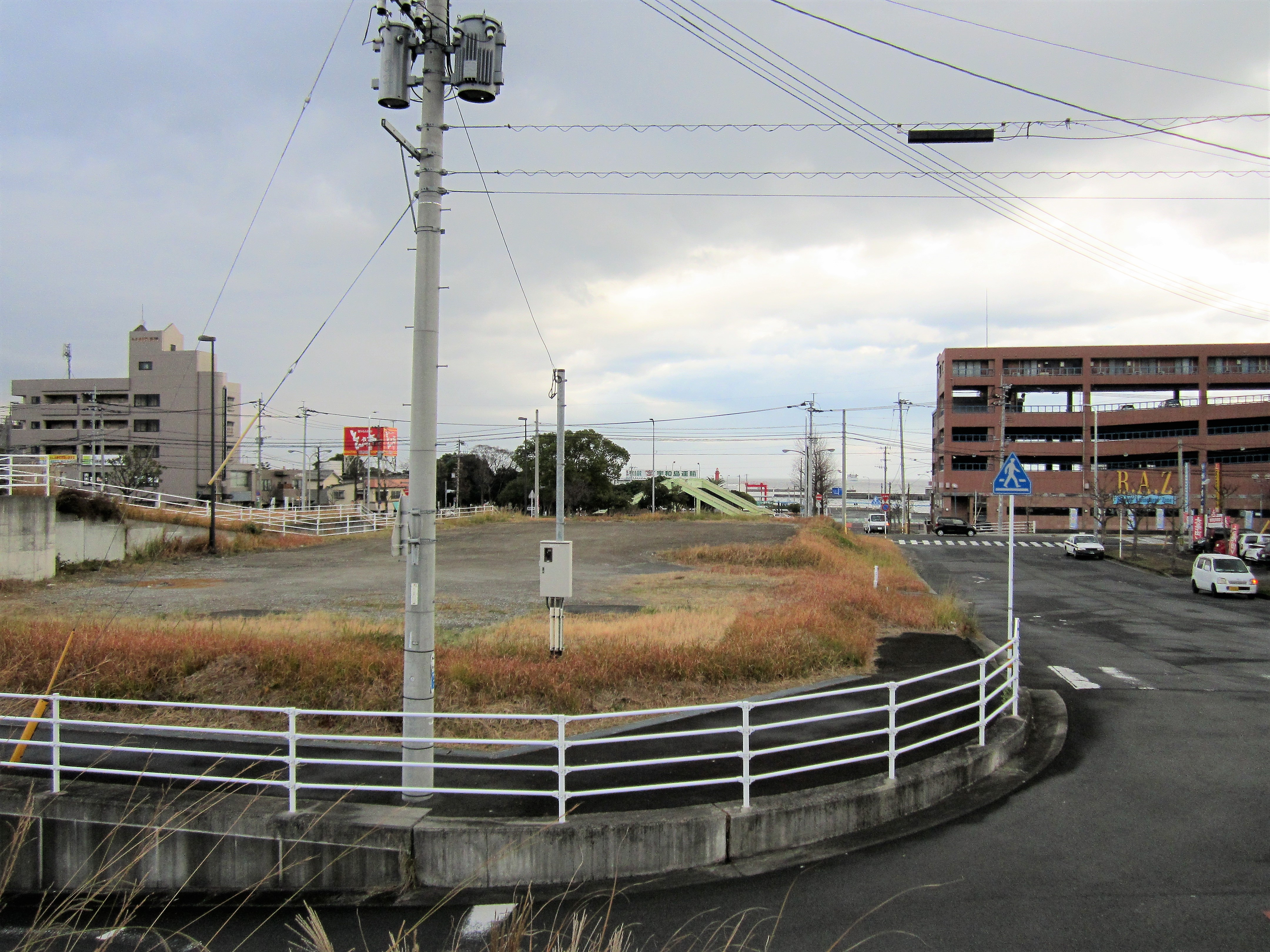 新別府駅予定地（観光港側の取付道路） Canon PowerShot A2200